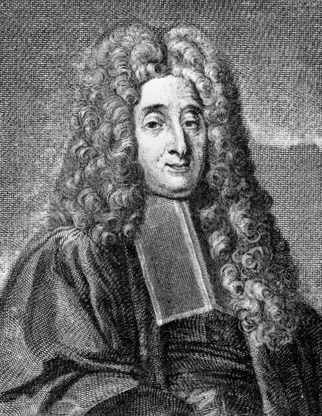 Portrait de Pierre Chirac, premier médecin du roi Louis XV.